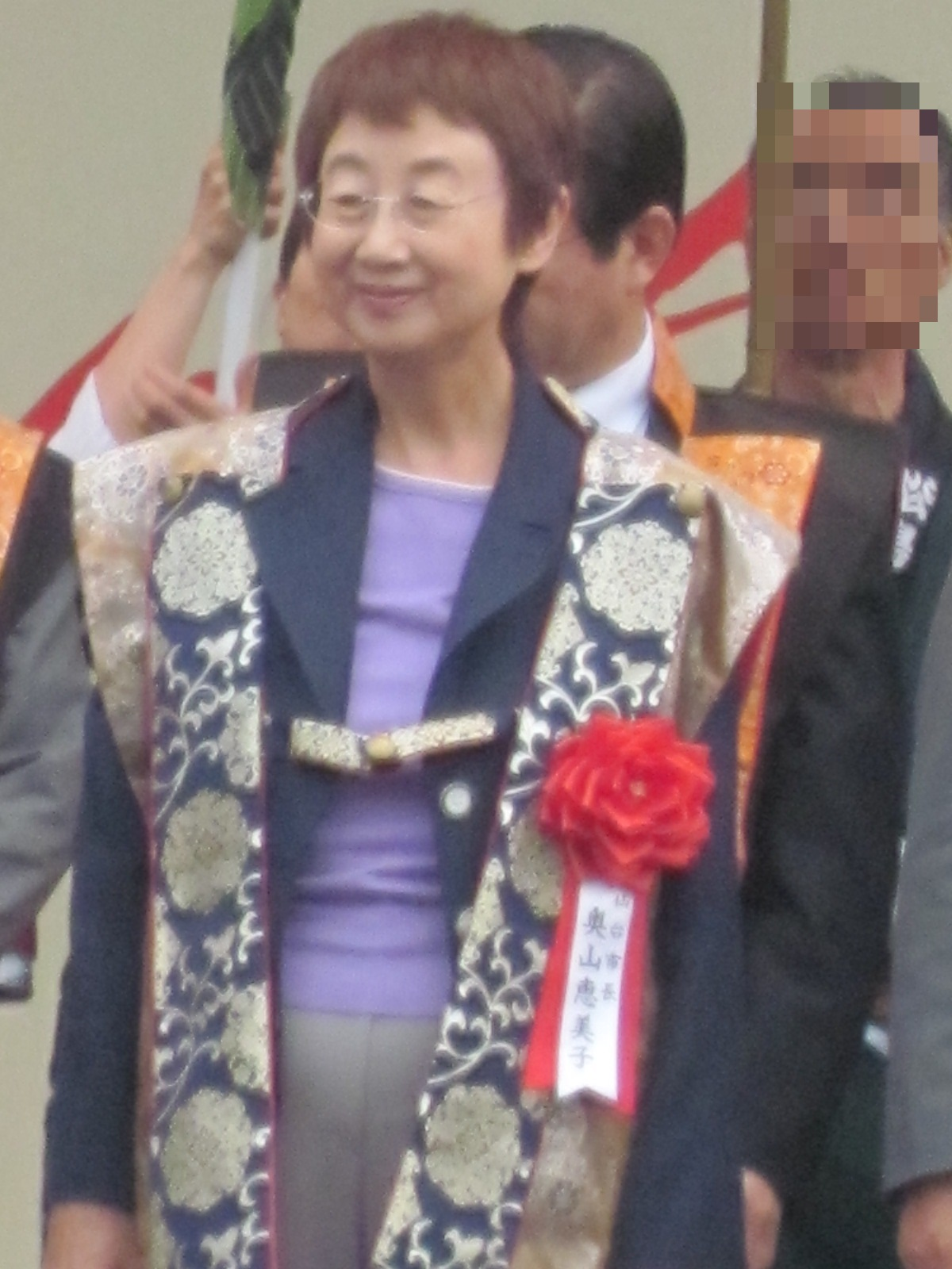 仙台市長奥山恵美子。2015年5月16日、仙台・青葉まつり開祭式にて。